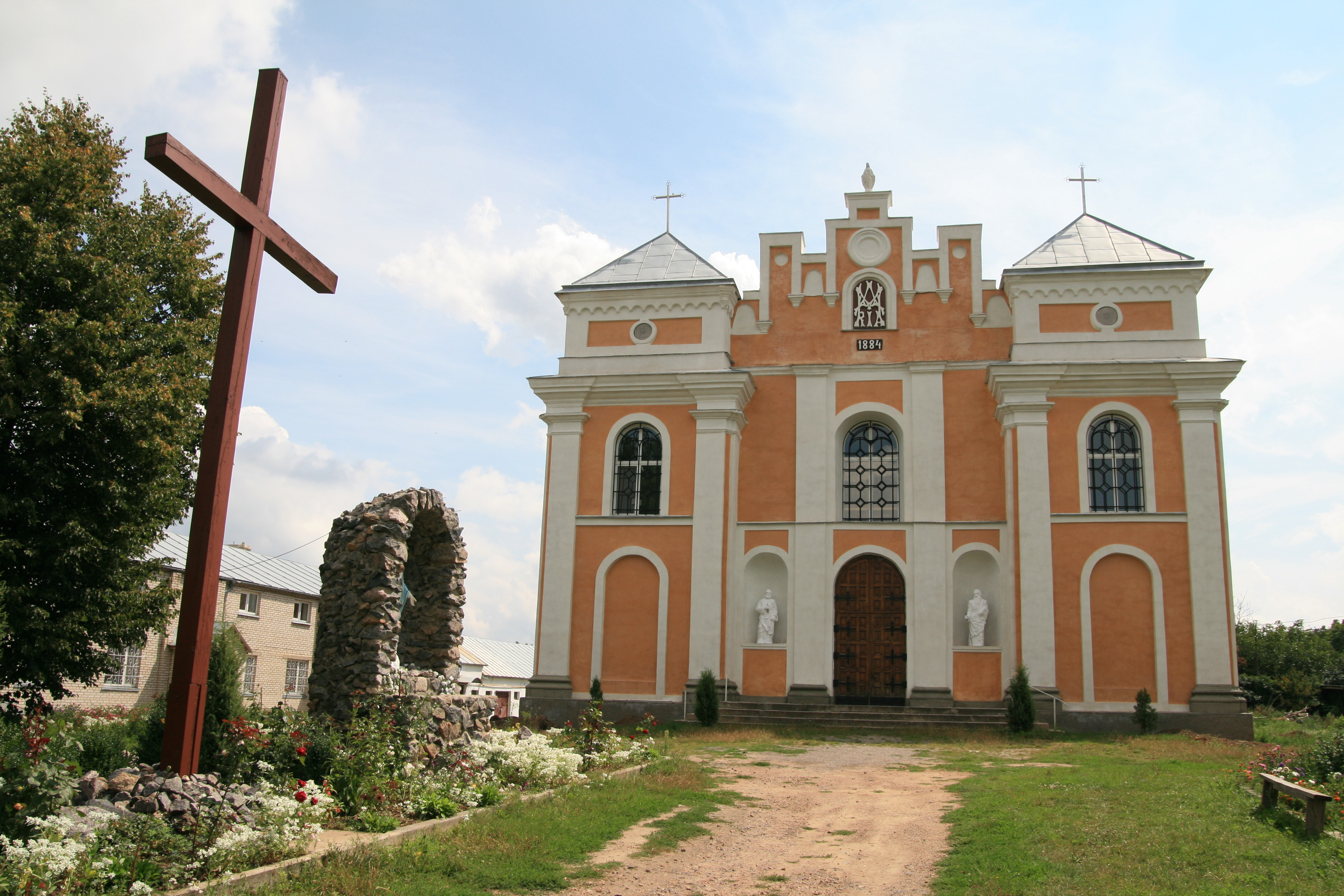 Костьол, Немирівський район, м. Брацлав, вул. Комарова,1